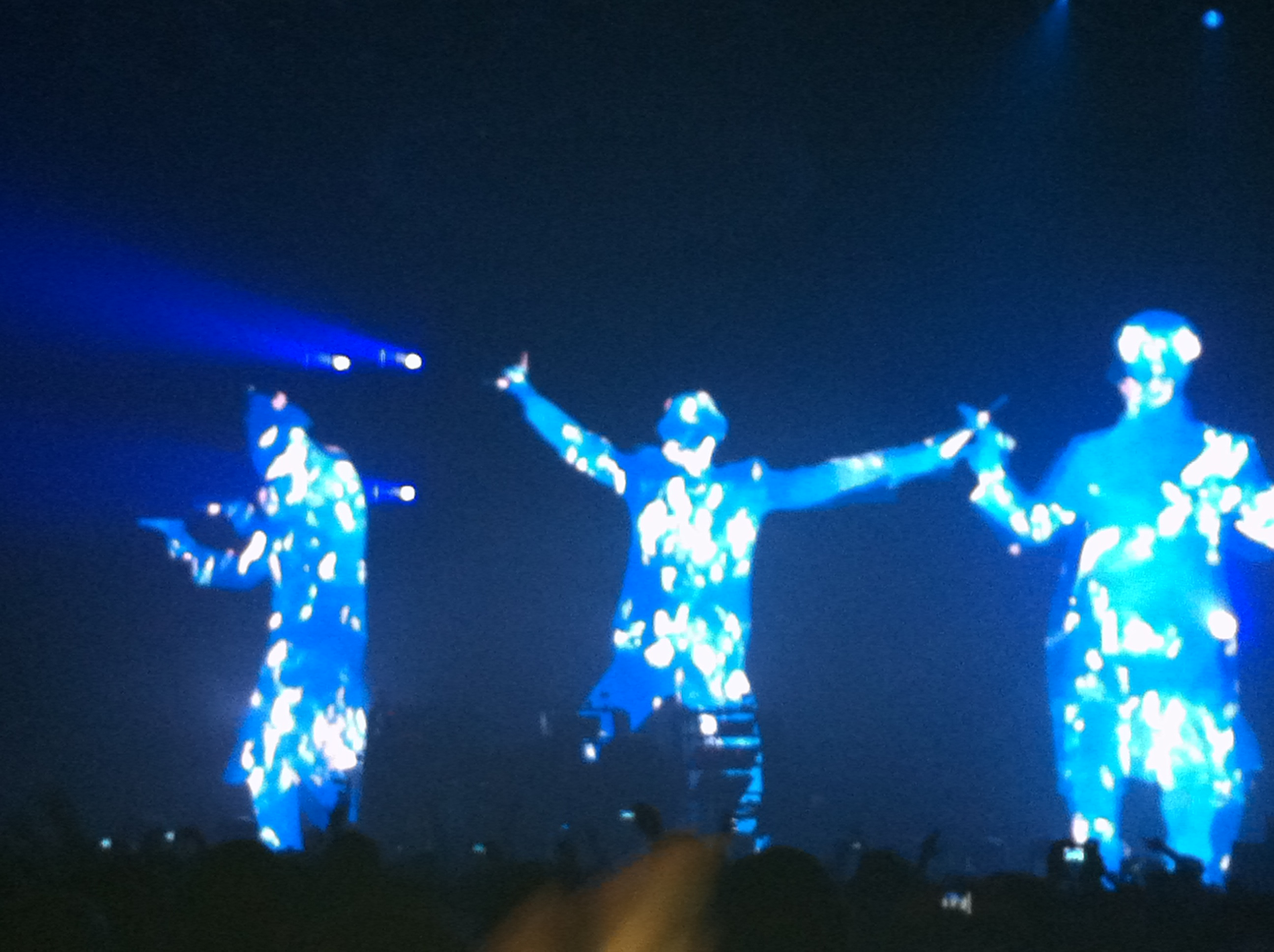 Concert du Zénith Paris 14/01/2011